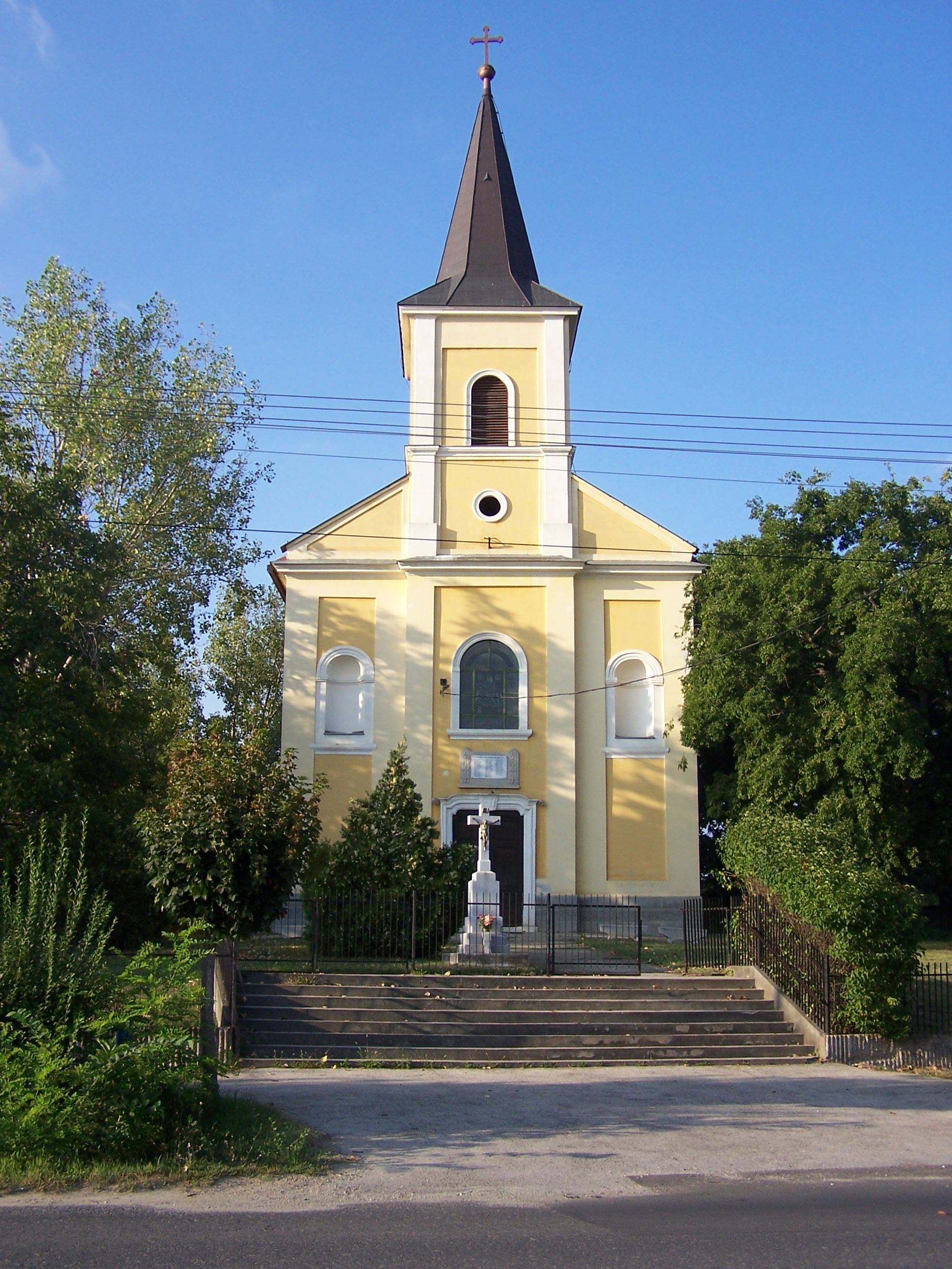 Római katolikus templom (Ecser, Szabadság tér)